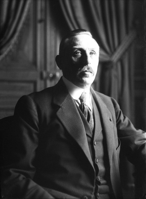 Portrait photographique de Célestin Hennion, préfet de police de Paris, en 1914, par l'agence Rol